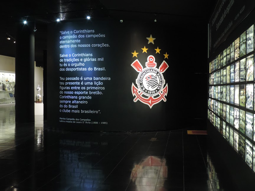 Hino do Corinthians ao lado do logo do time